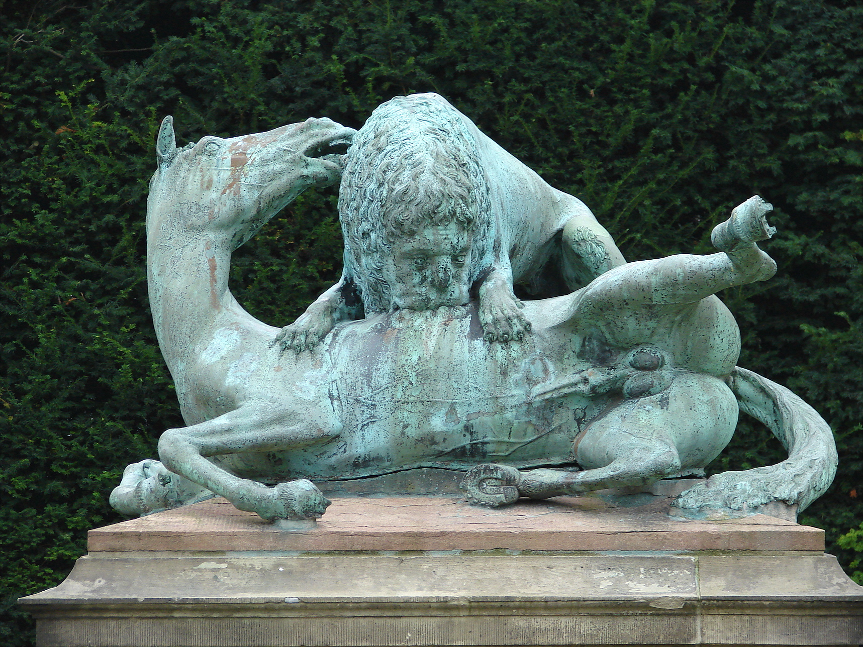 Løven og Hesten, Peter Husum og Jørgen Wulff, 1625, Rosenborg Have, København